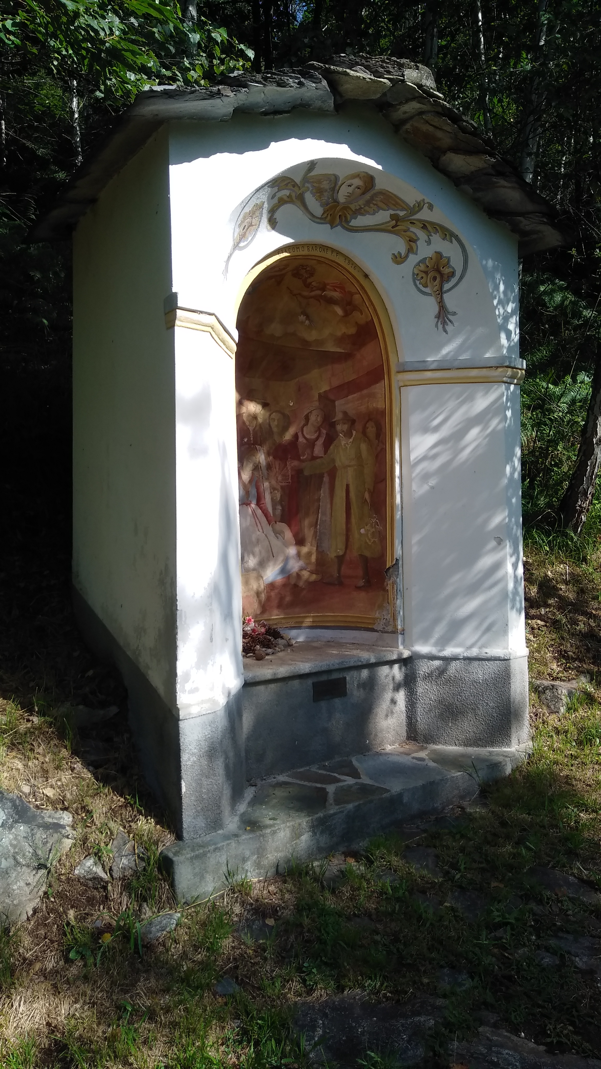 Santuario della Beata Panacea al Monte (Quarona, VC) cappella percorso devozionale